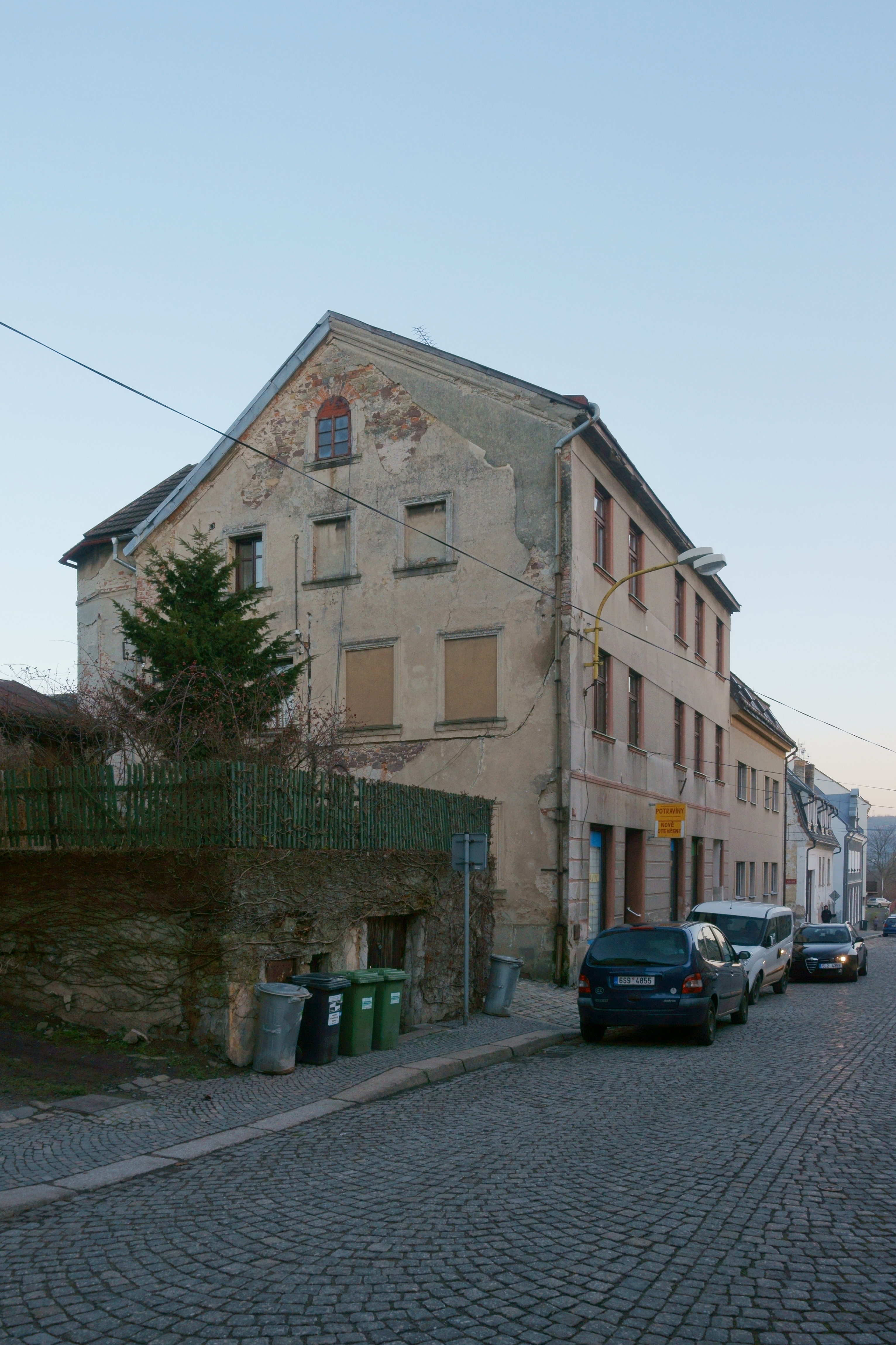 Hodkovice nad Mohelkou - dům, 200